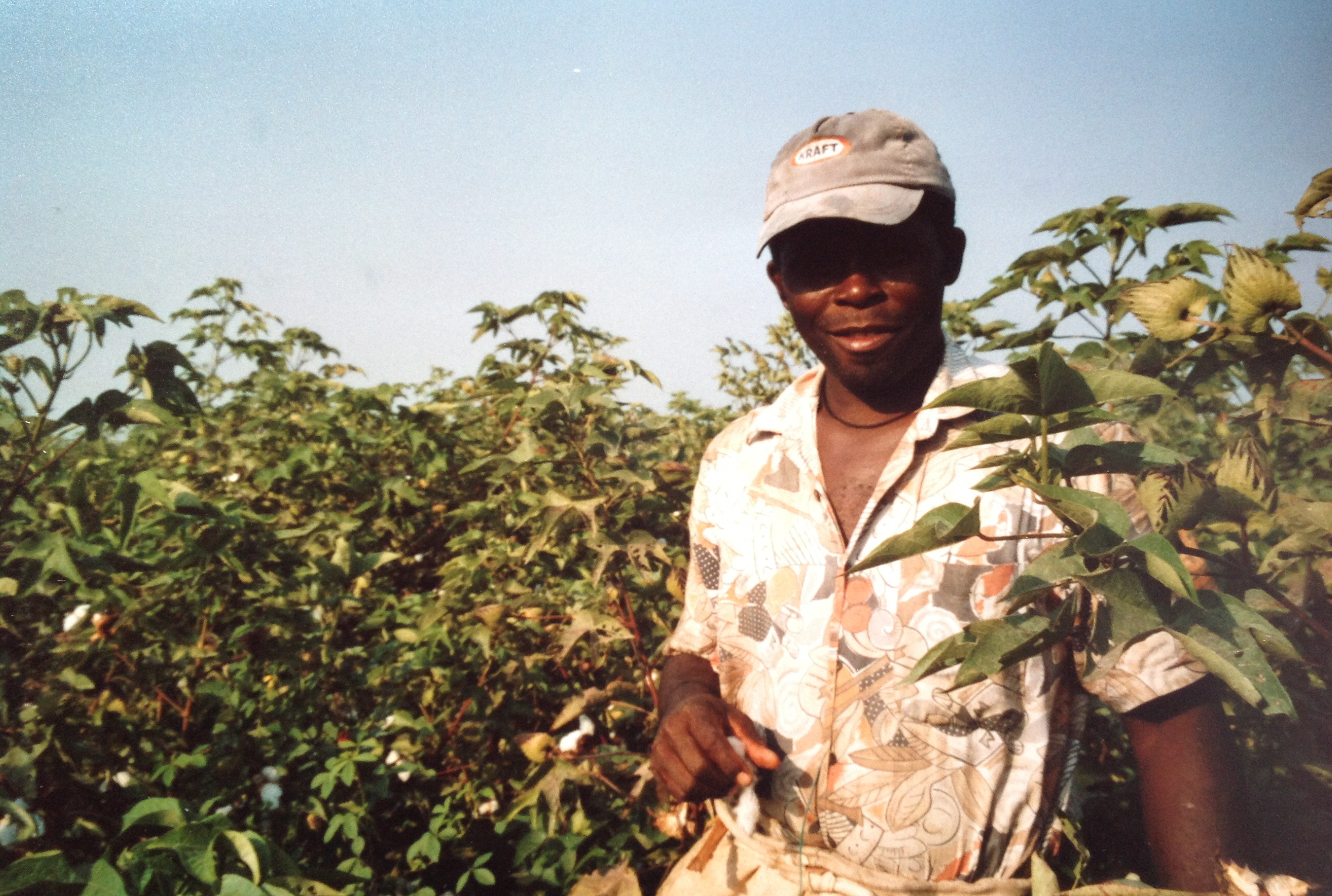 Récolte du coton à El Carmen - Chincha - Pérou - Prise de vue effectuée durant le tournage du Documentaire "Negra"